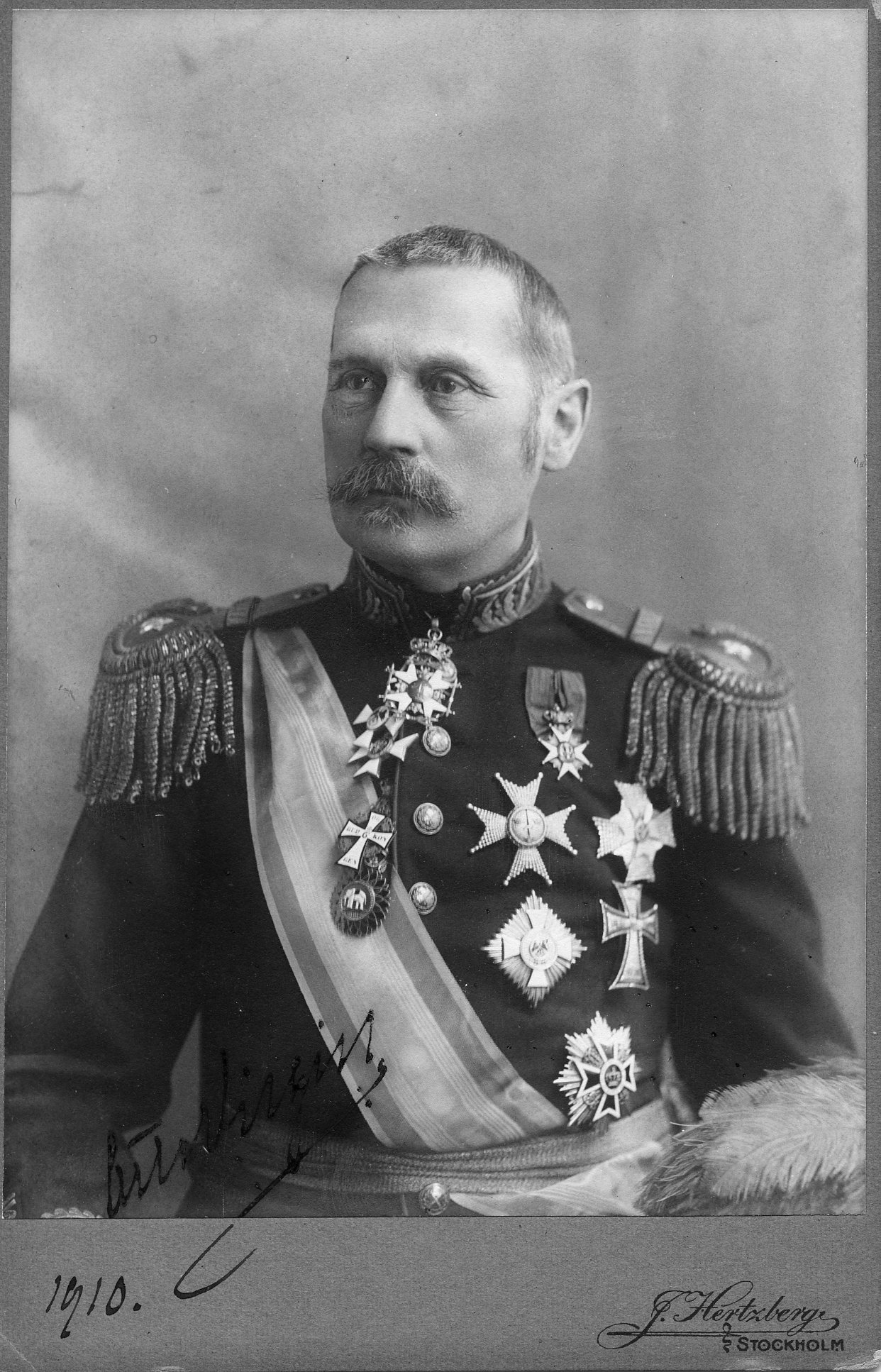 General Otto Virgin